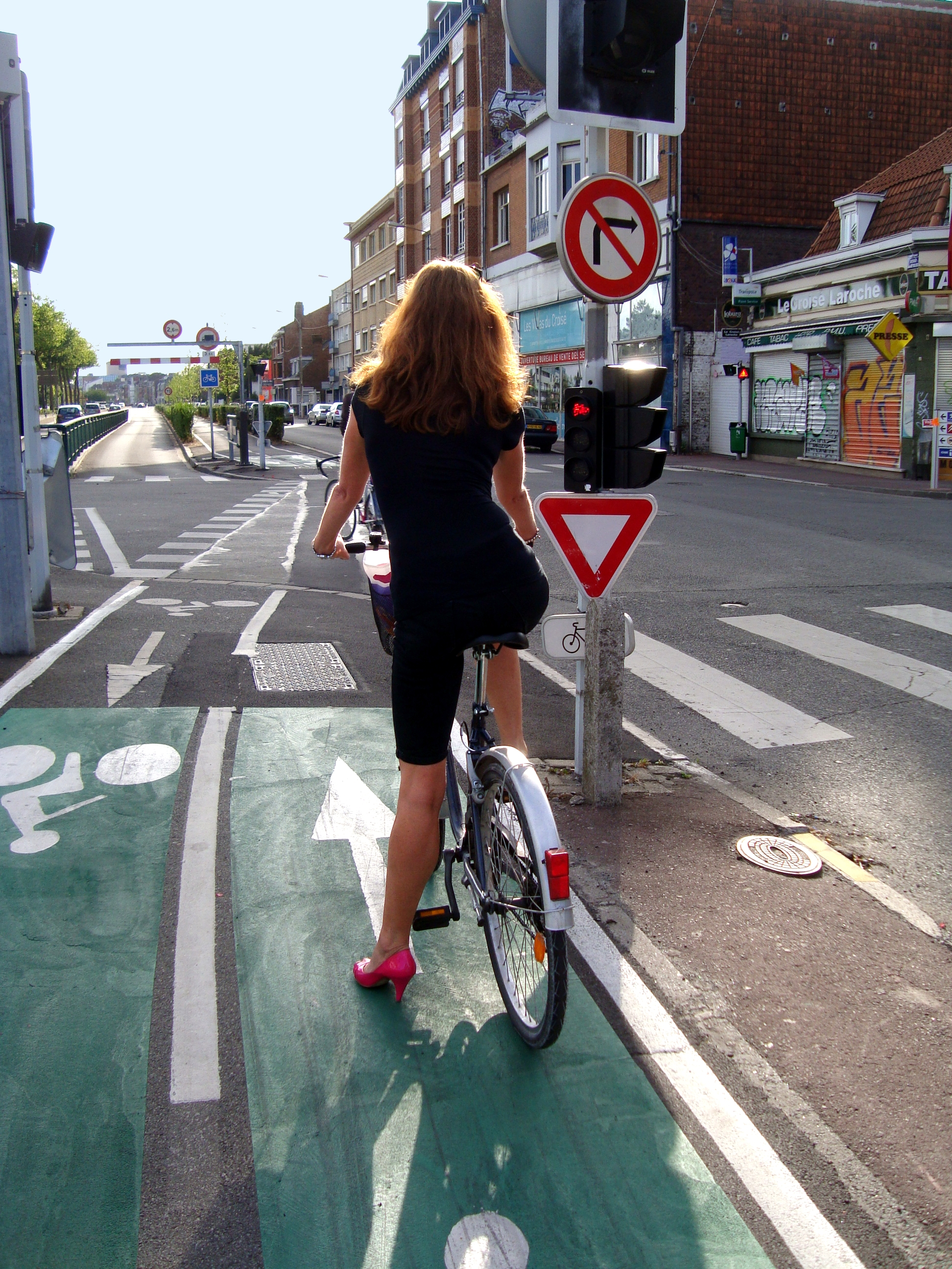 Piste cyclable à Marcq-en-Baroeul (Nord).